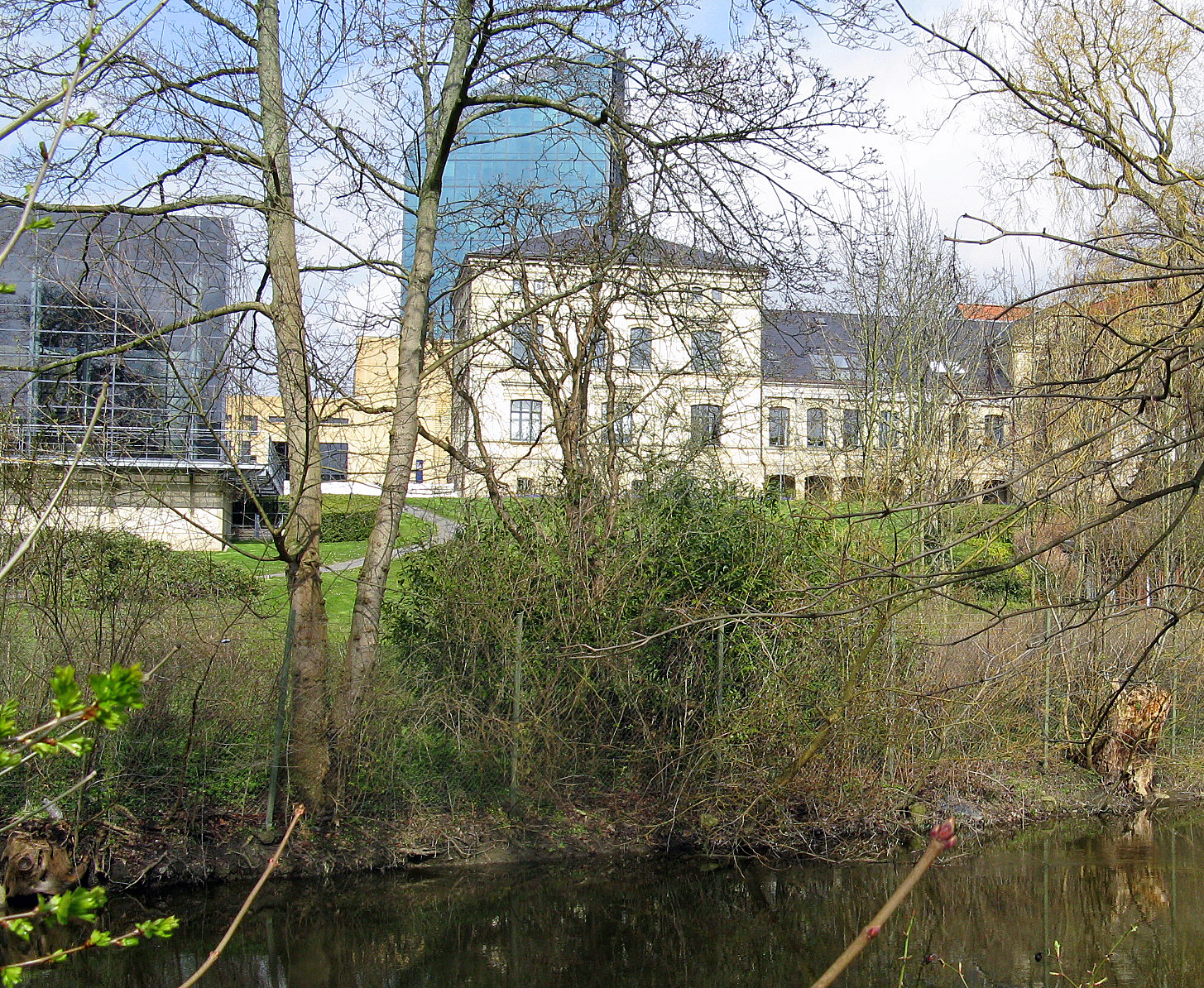 Ceresbryggeriet i Århus, set fra Århus Å; I baggrunden højhuset Prismet